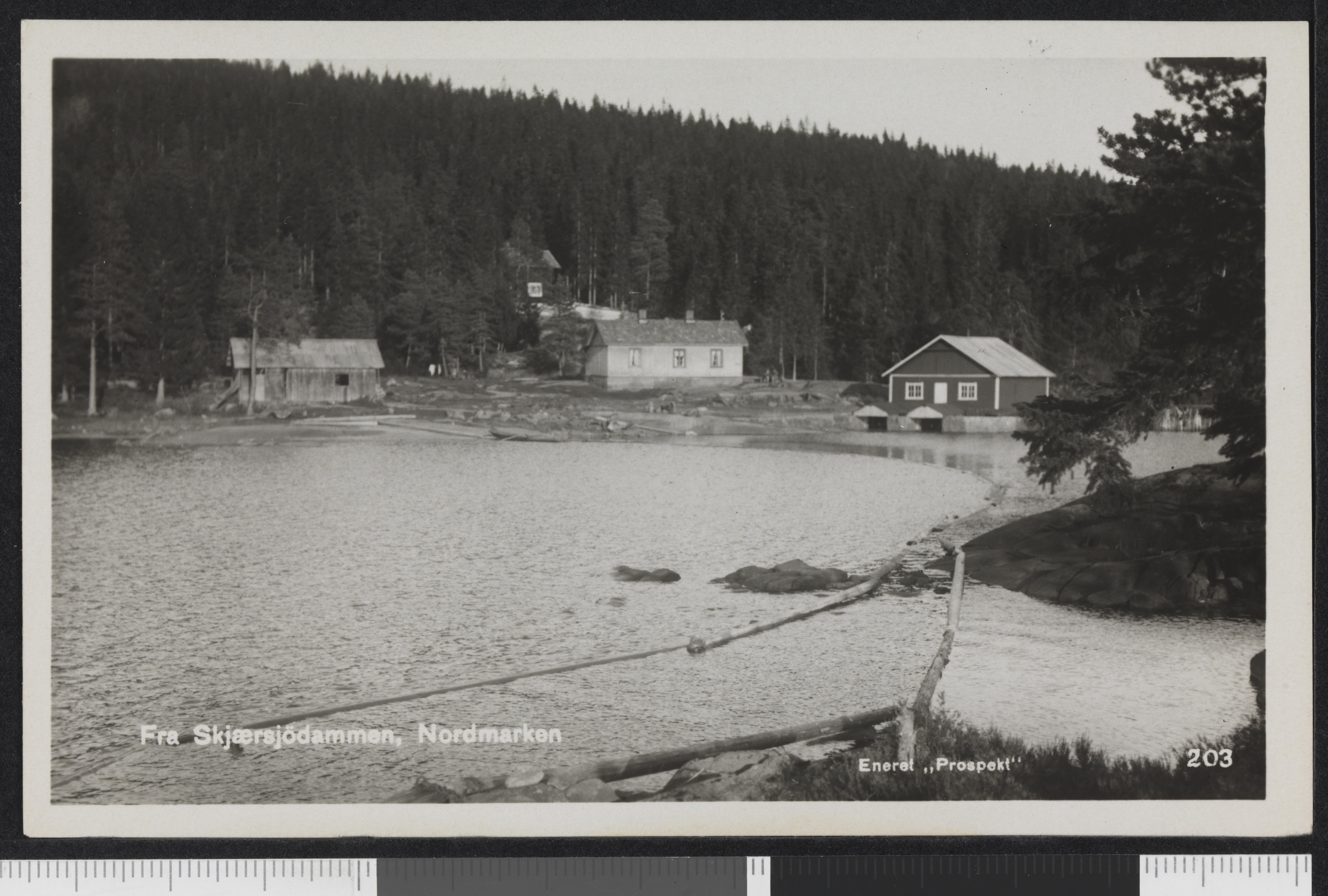 Bildet er hentet fra Nasjonalbibliotekets bildesamling Nordmarka,Skjærsjødammen, Oslo, Oslo